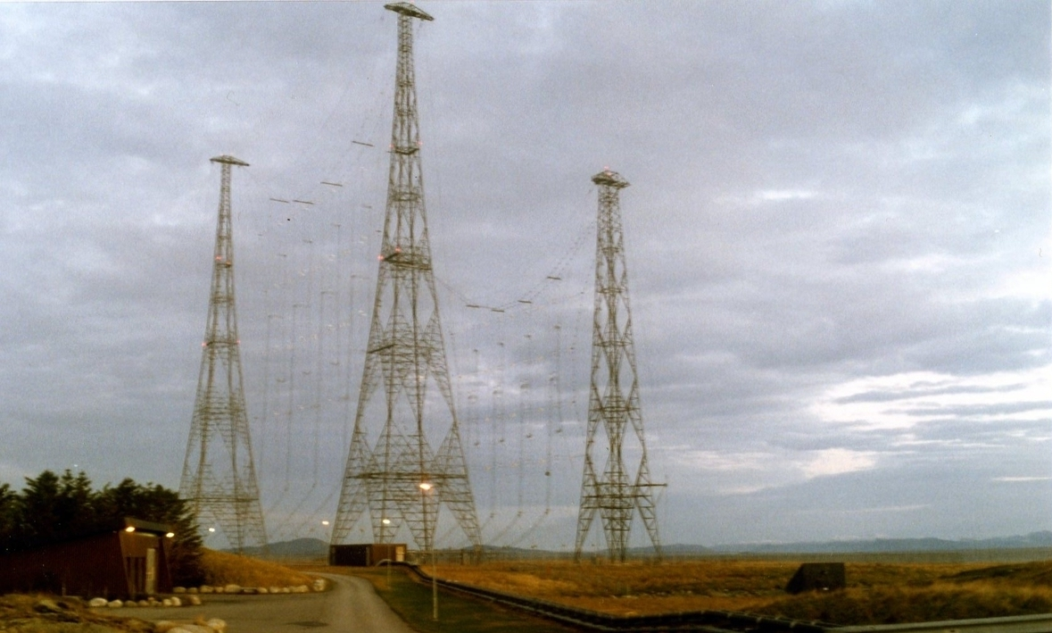 Kvitsøy kringkaster 1991-1992